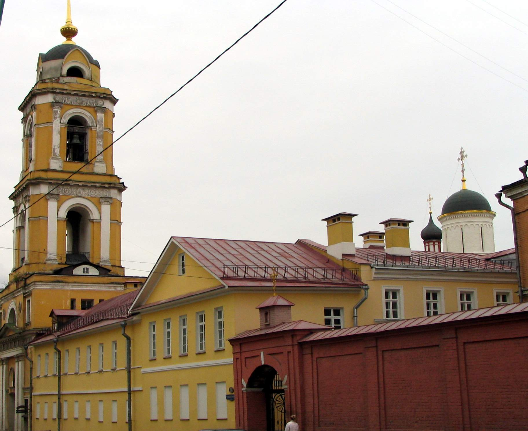 Moscow,_Rozhdestvensky_Monastery